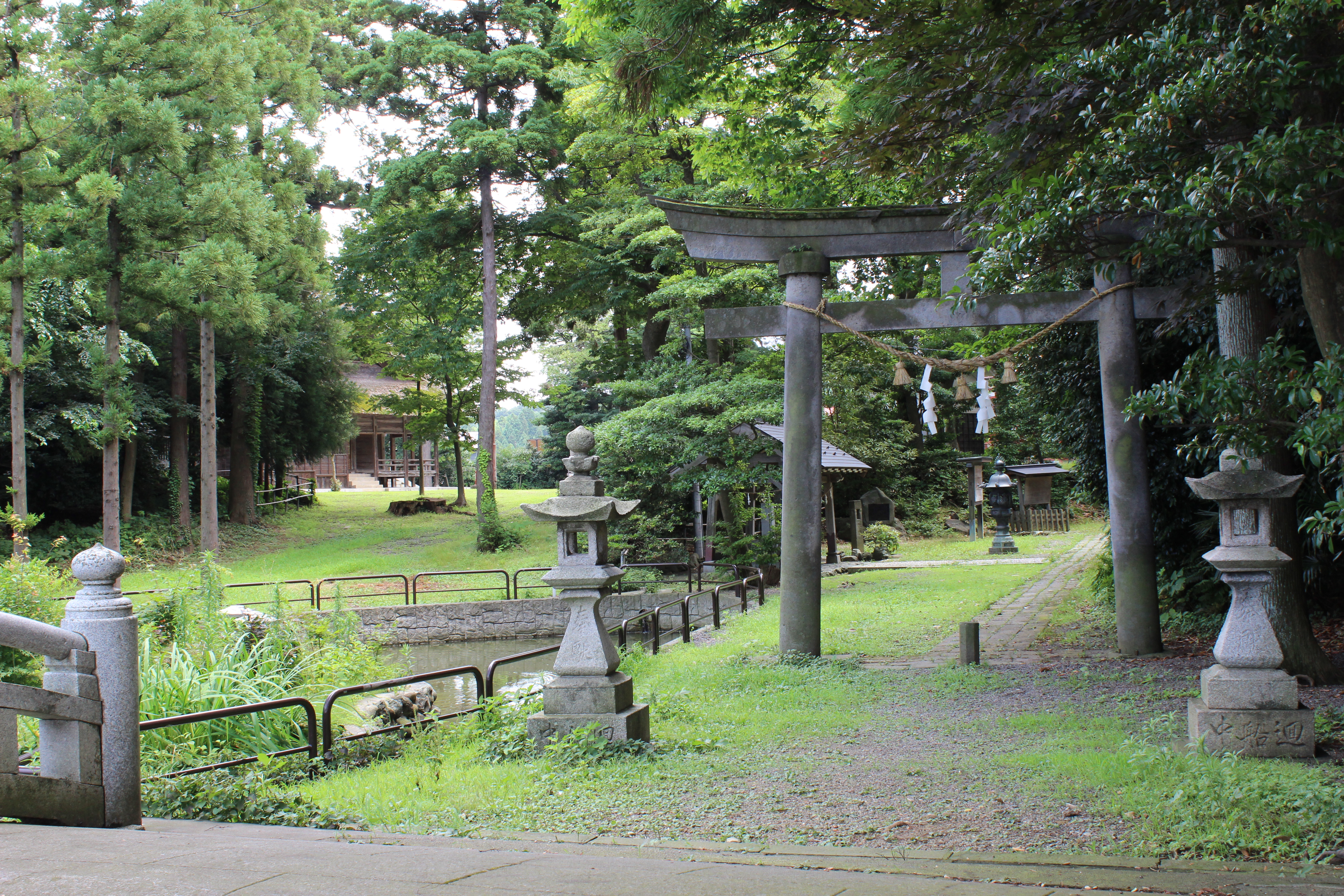 天津神社。新潟県糸魚川市一の宮1-3-34。